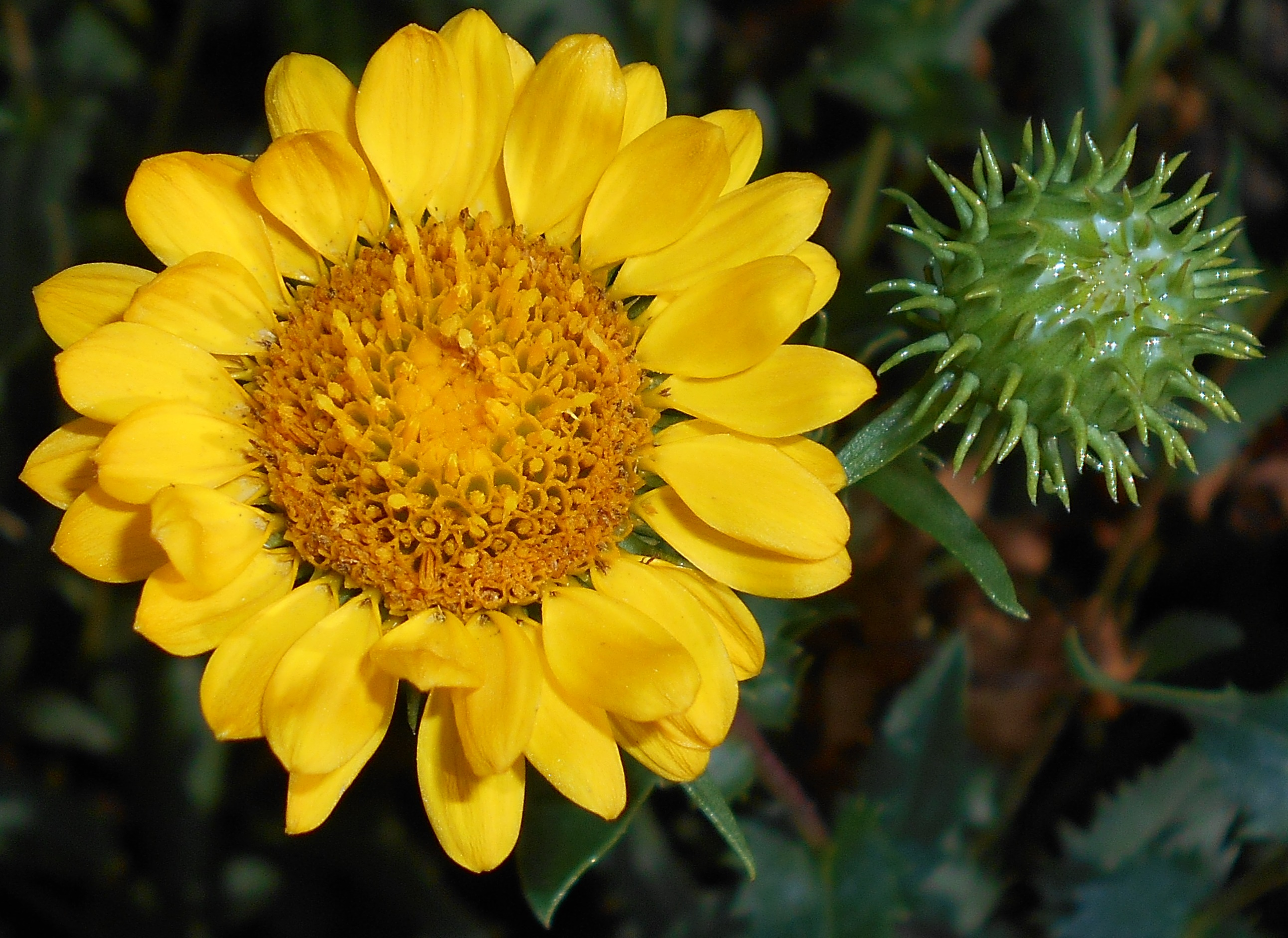 Grindelia szorstka (Grindelia squarrosa), Ogród Botaniczny UMCS w Lublinie.